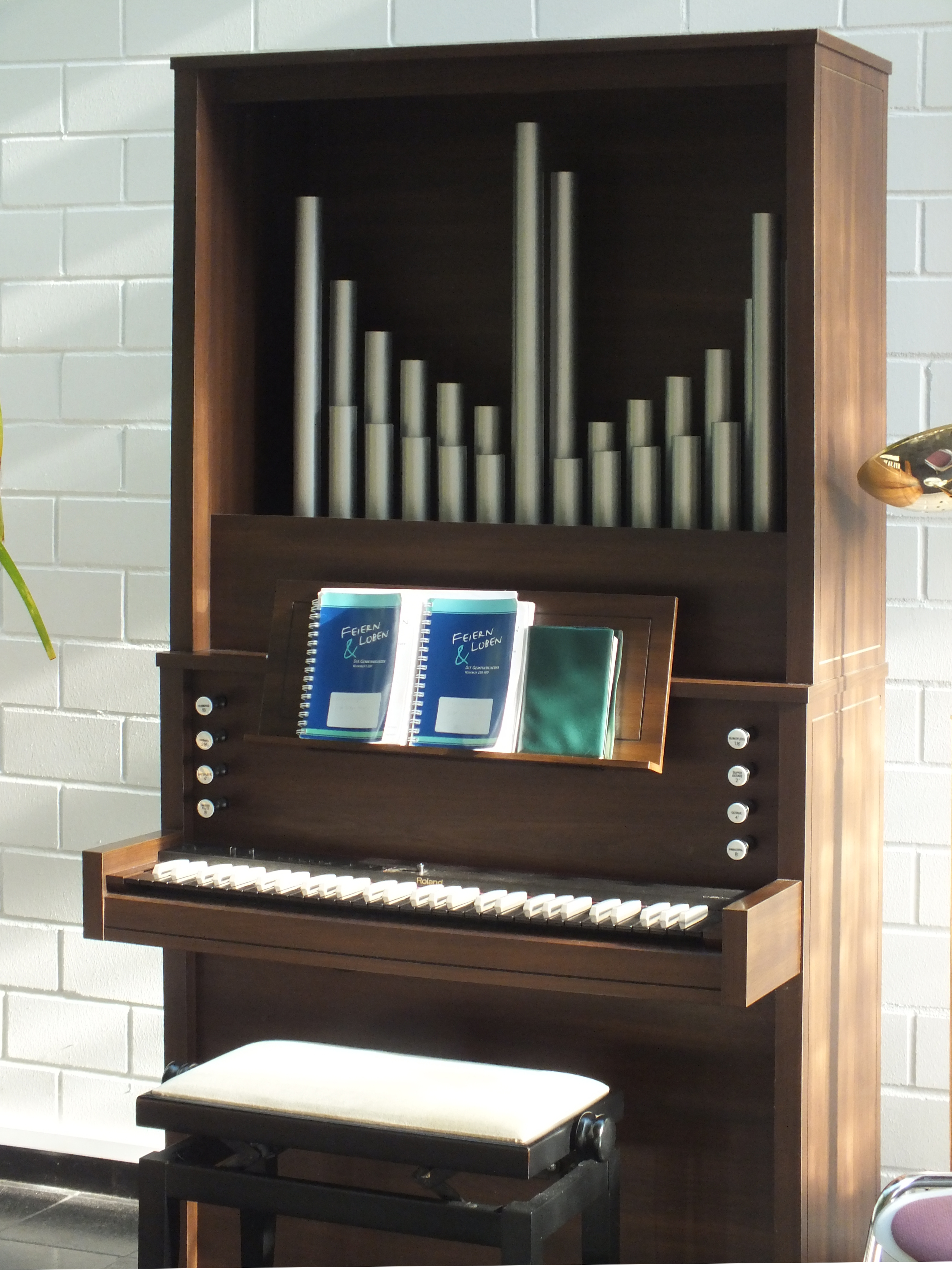 Straße in Berlin-Friedrichshagen: Klutstraße, Freikirchliche Gemeinde (Baptisten) "Friedenskirche"